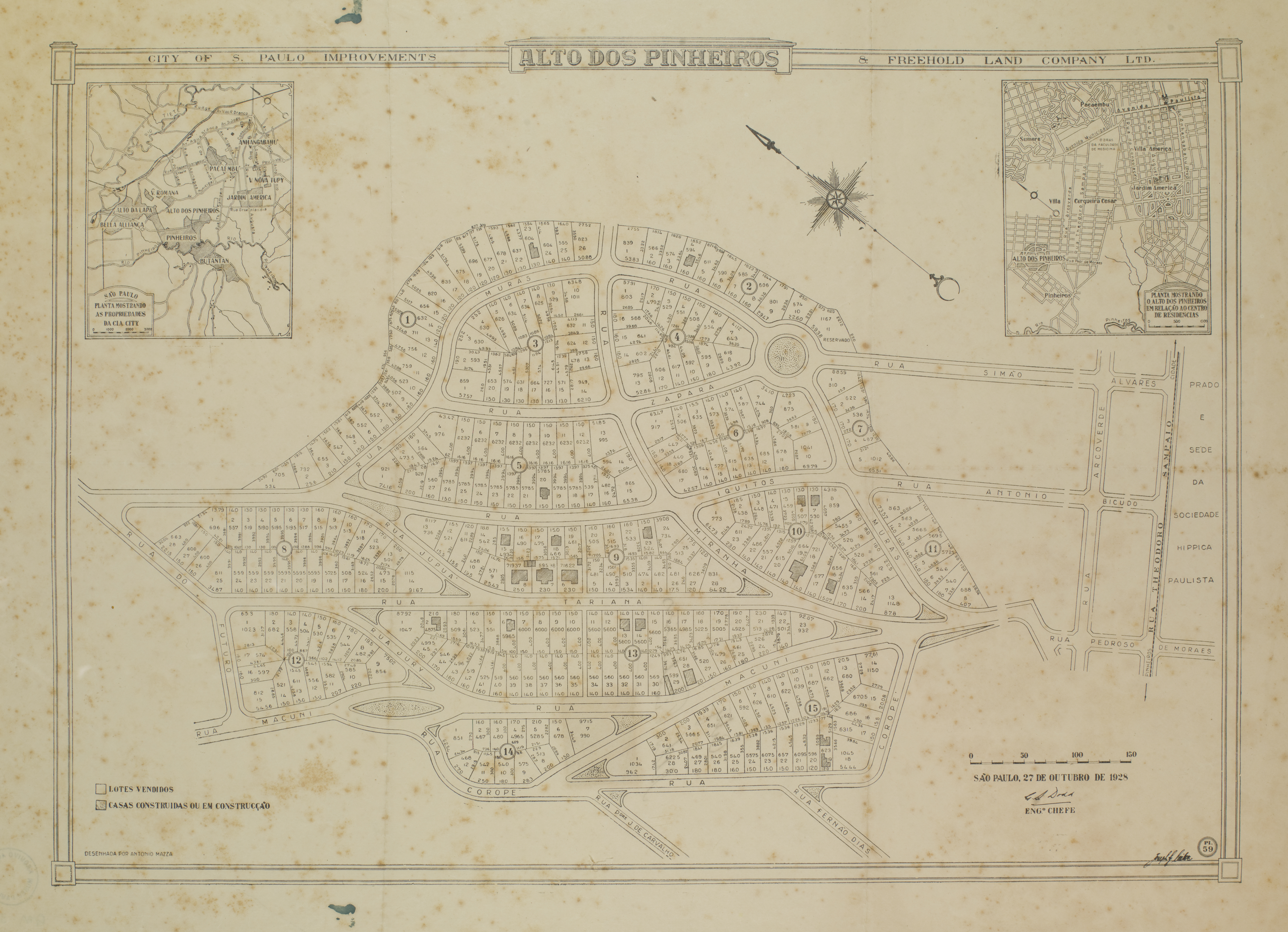 Obra que integra o acervo do Museu Paulista da USP. Coleção João Baptista de Campos Aguirra - Ref. Agente: City of São Paulo Improvements & Freehold Land Company Ltd